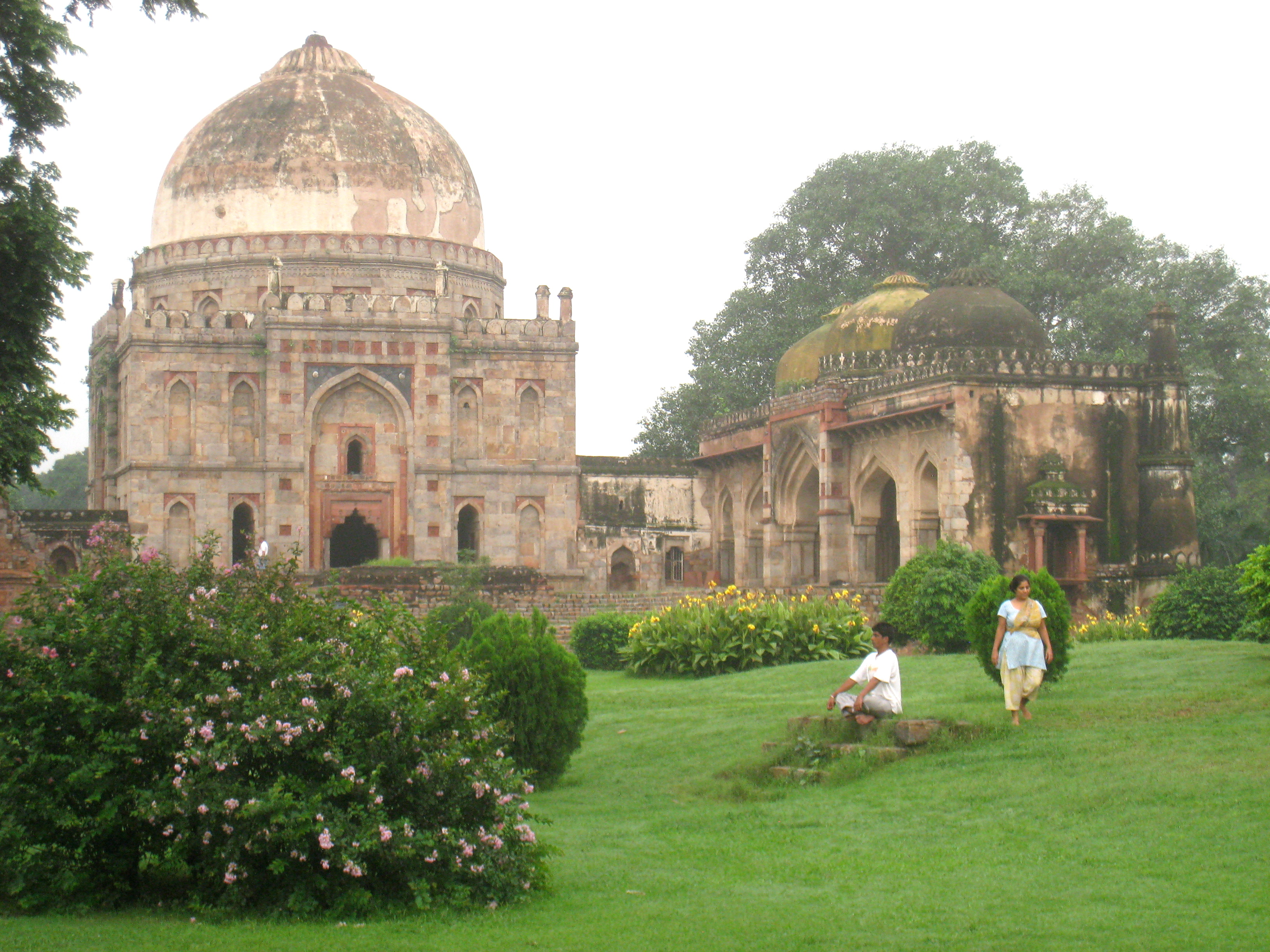 Bara Gumbad tomb, in Lodi Gardens at dawn, New Delhi, India.